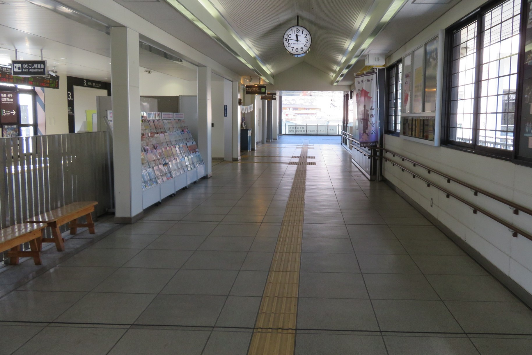 備中高梁駅橋上駅舎内の自由通路